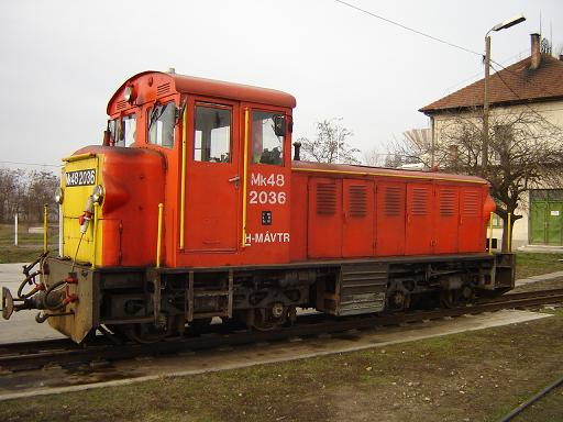 Mk48-as mozdony üzemanyagtöltés közben a Kecskeméti Kisvasút állomásán